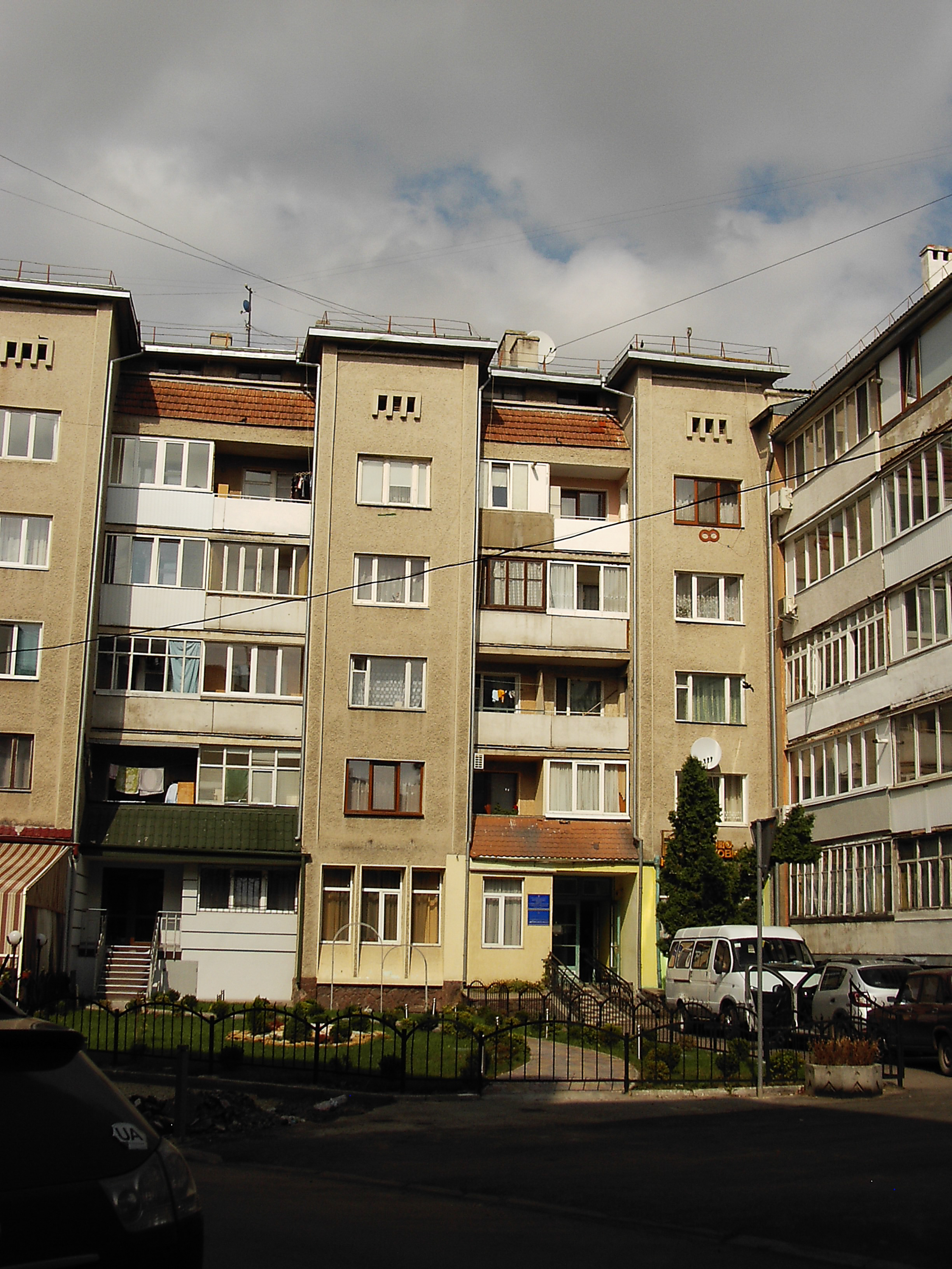 Івано-Франківський обласний державний Центр з фізичної культури і спорту інвалідів «Інваспорт». Обласна дитячо-юнацька спортивна школа інвалідів. (м. Івано-Франківськ)